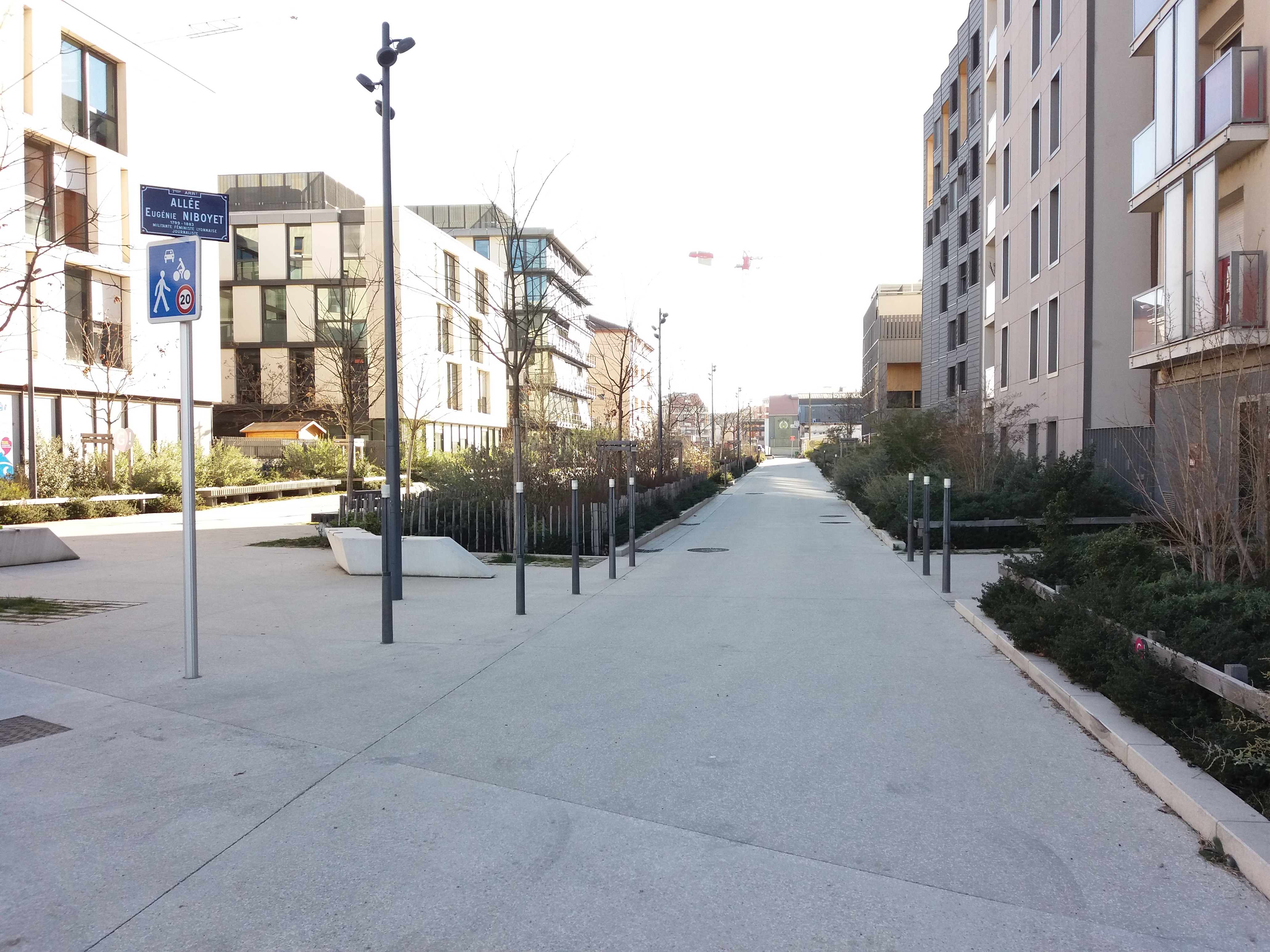 Depuis la rue Pré Gaudry.